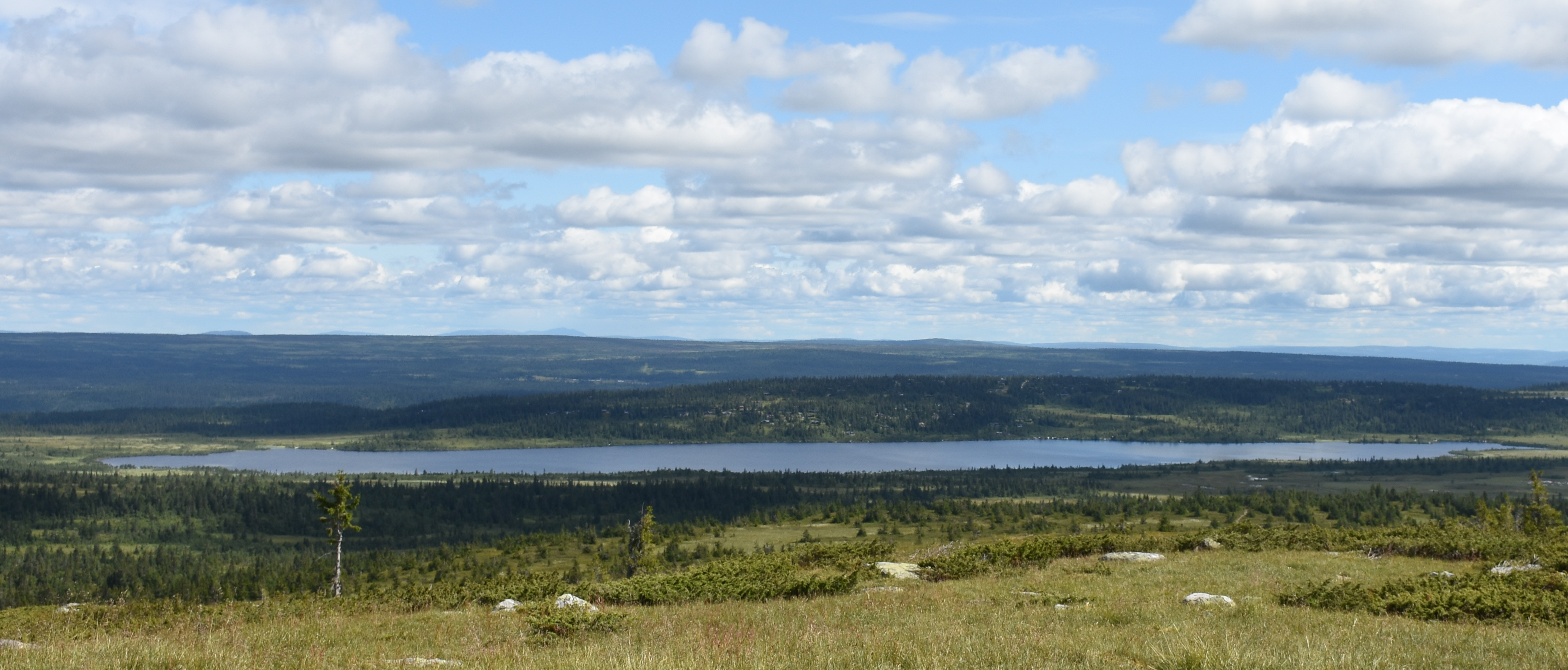 Grunna sett fra Snørvillen